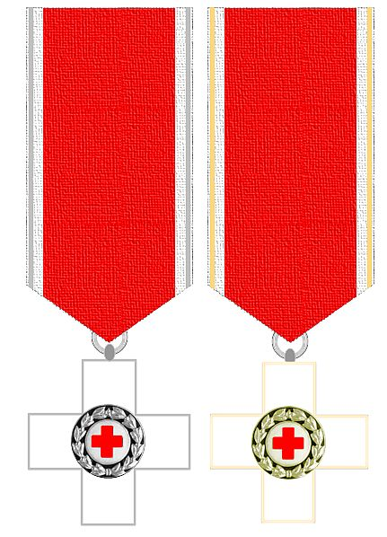 Ehrenkreuz des Deutschen Roten Kreuzes (ab 1953)